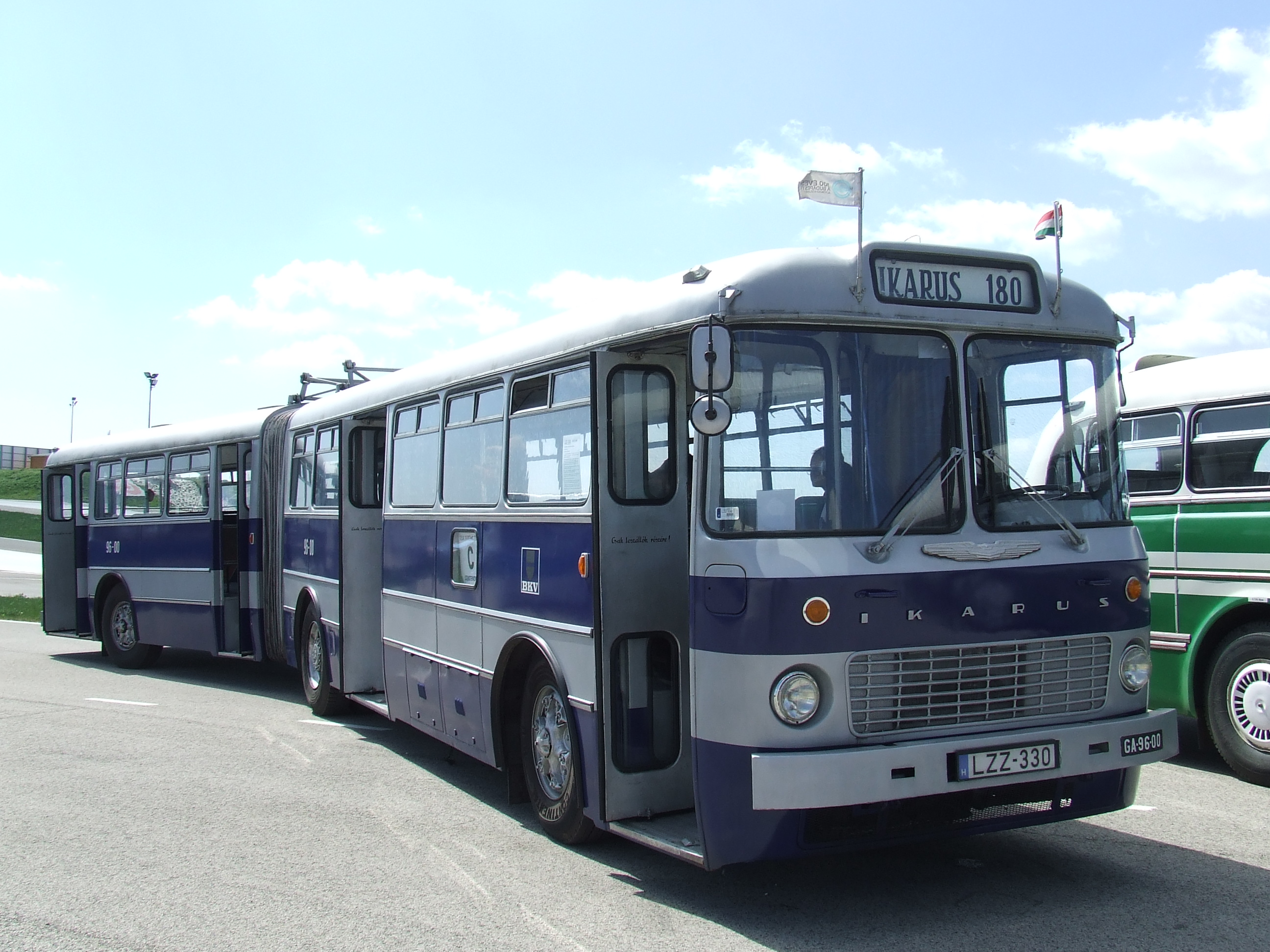 Busexpo 2016, Zsámbék